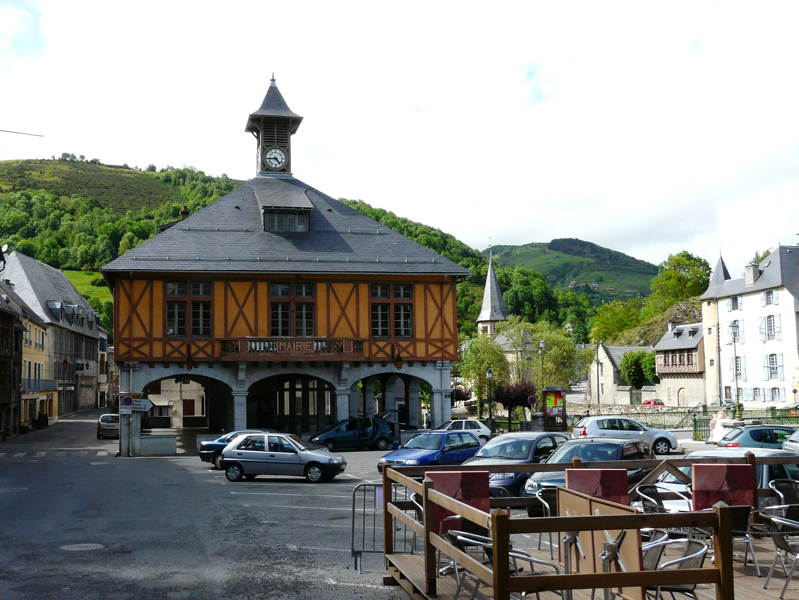 La place de la mairie, Arreau, Hautes-Pyrénées, France.